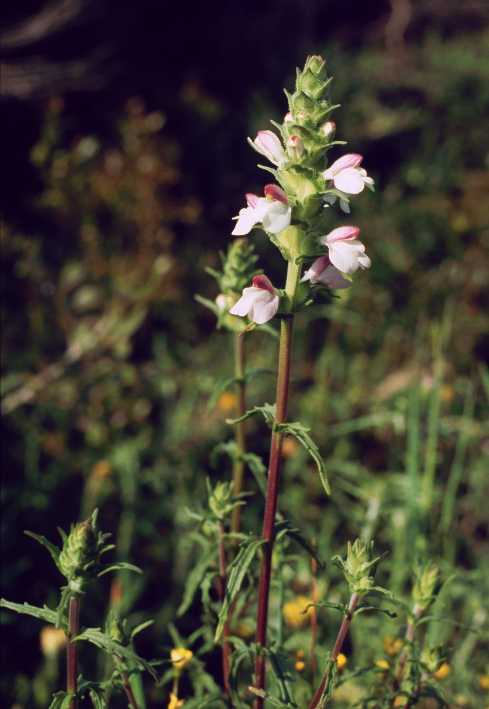 Bartsia trixago, Sommerwurzgewächse (Orobanchaceae) – Griechenland/Ελλάδα/Greece: Akra Ag. Theodóri/Άκρα Άγ. Θεόδωροι NW Argostoli/Αργοστόλι (Kefallinia/Κεφαλληνία)